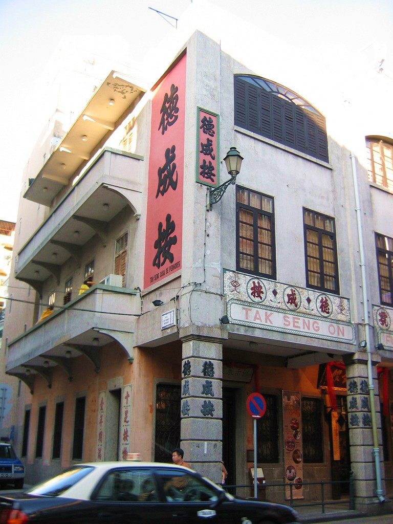 澳門德成按 - Pawnbroker in Macau.